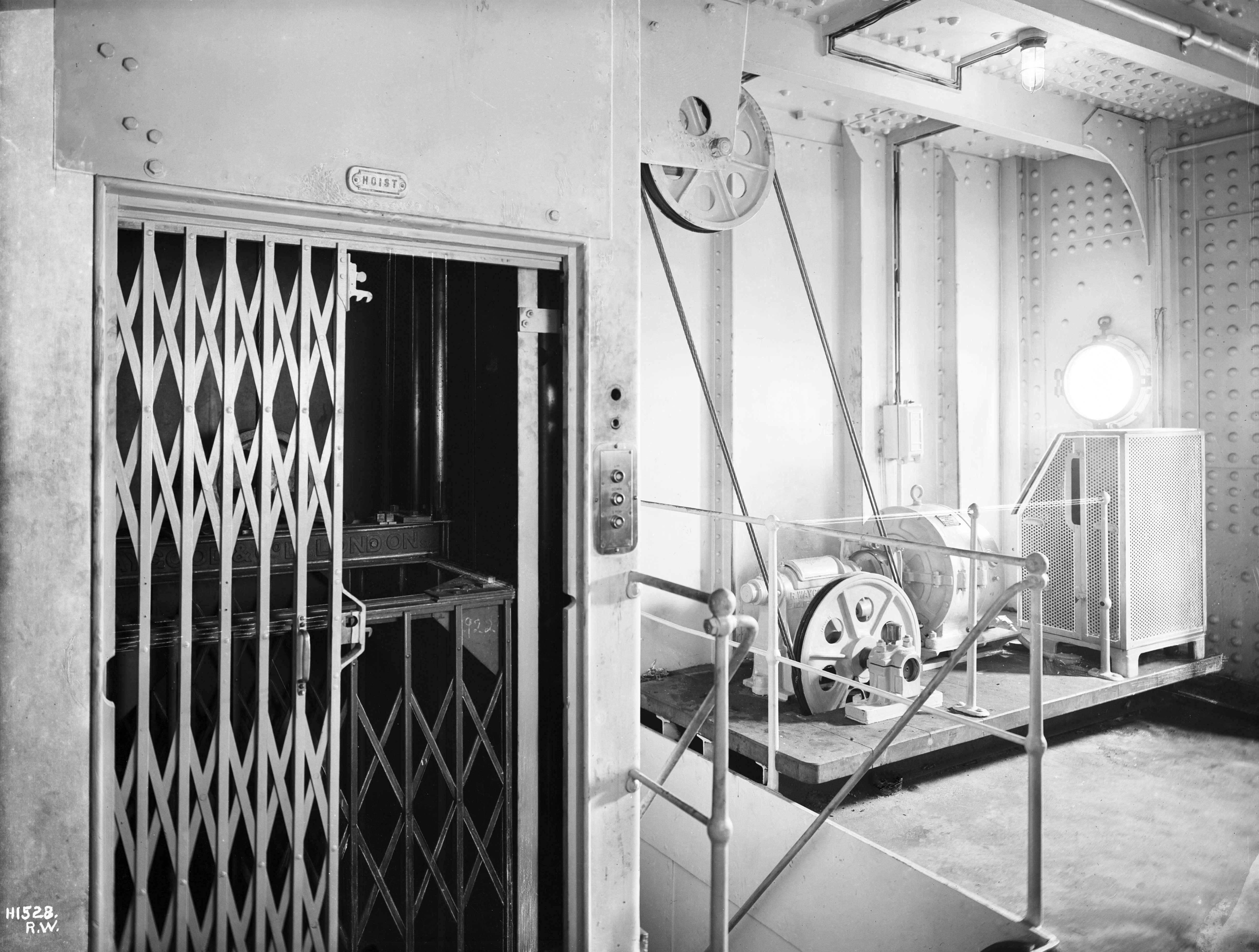 H1528 R.W.